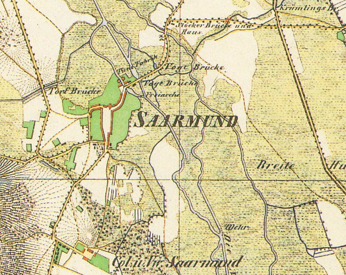 Saarmund, Gem. Nuthetal, Lkr. Potsdam-Mittelmark, Brandenburg, Urmesstischblatt, Blatt Potsdam 3644